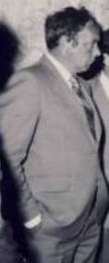 // 1982 Guvernatorul General al Canadei Edward Schreyer la MIRSR //